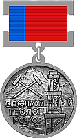 Заслуженный геолог РСФСР